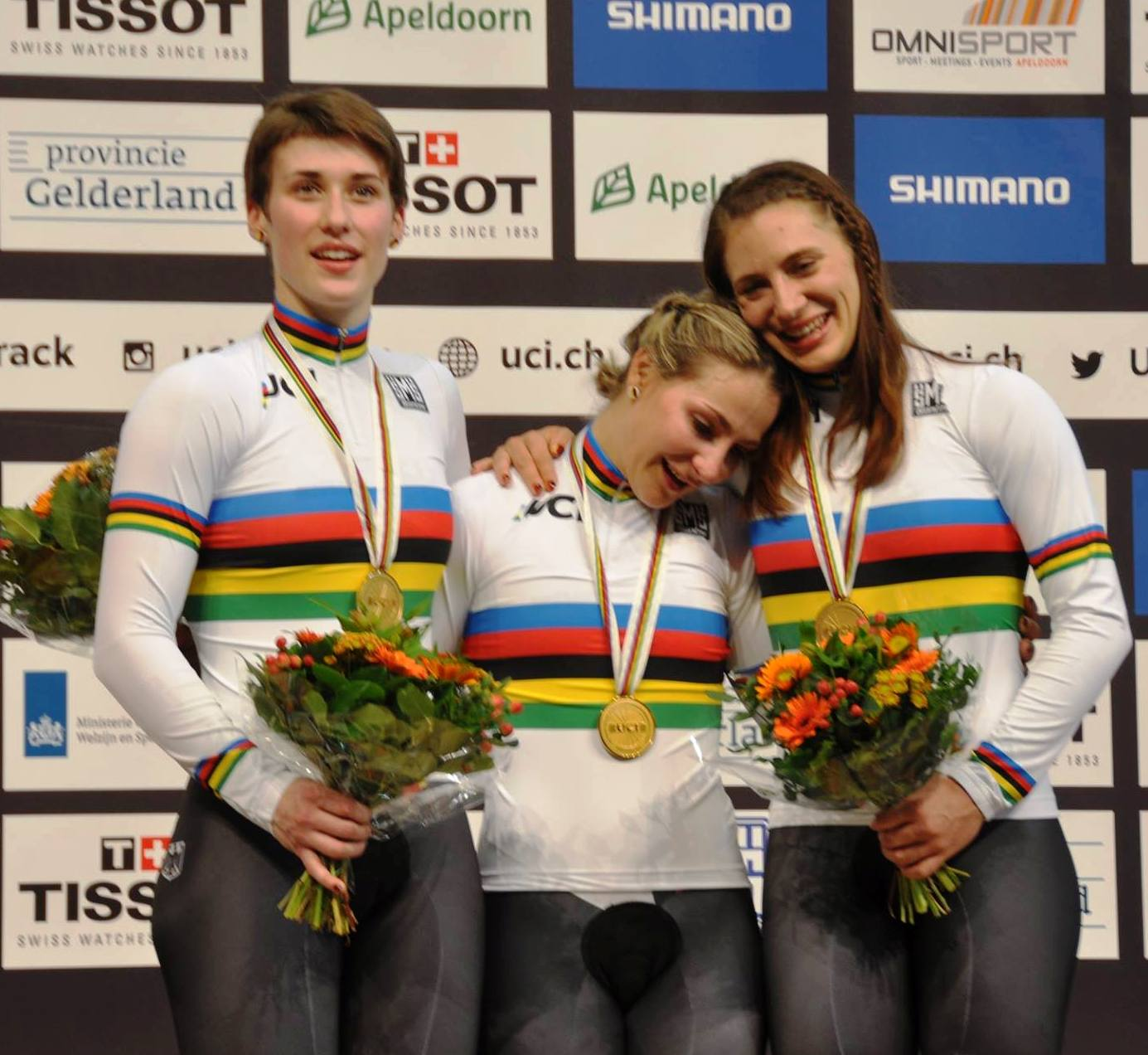 Weltmeisterinnen im Teamsprint (v.l.n.r.): Pauline Grabosch, Kristina Vogel, Miriam Welte (deutsche Radsportlerinnen)